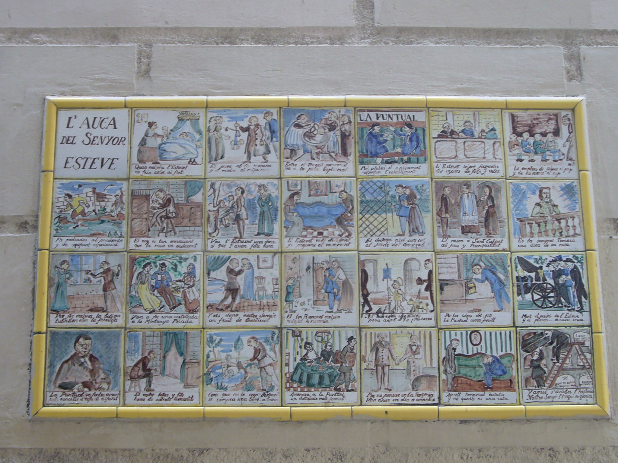 Auca del senyor Esteve - Carrer Petritxol